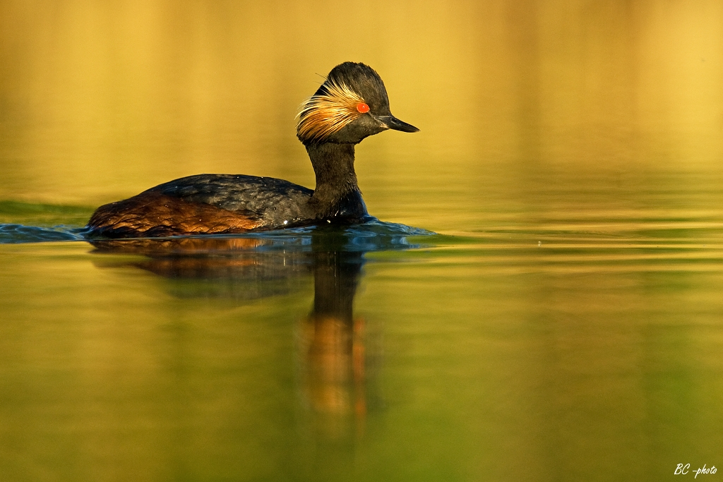 Podiceps nigricollis, Jakubovské rybníky, Slovakia